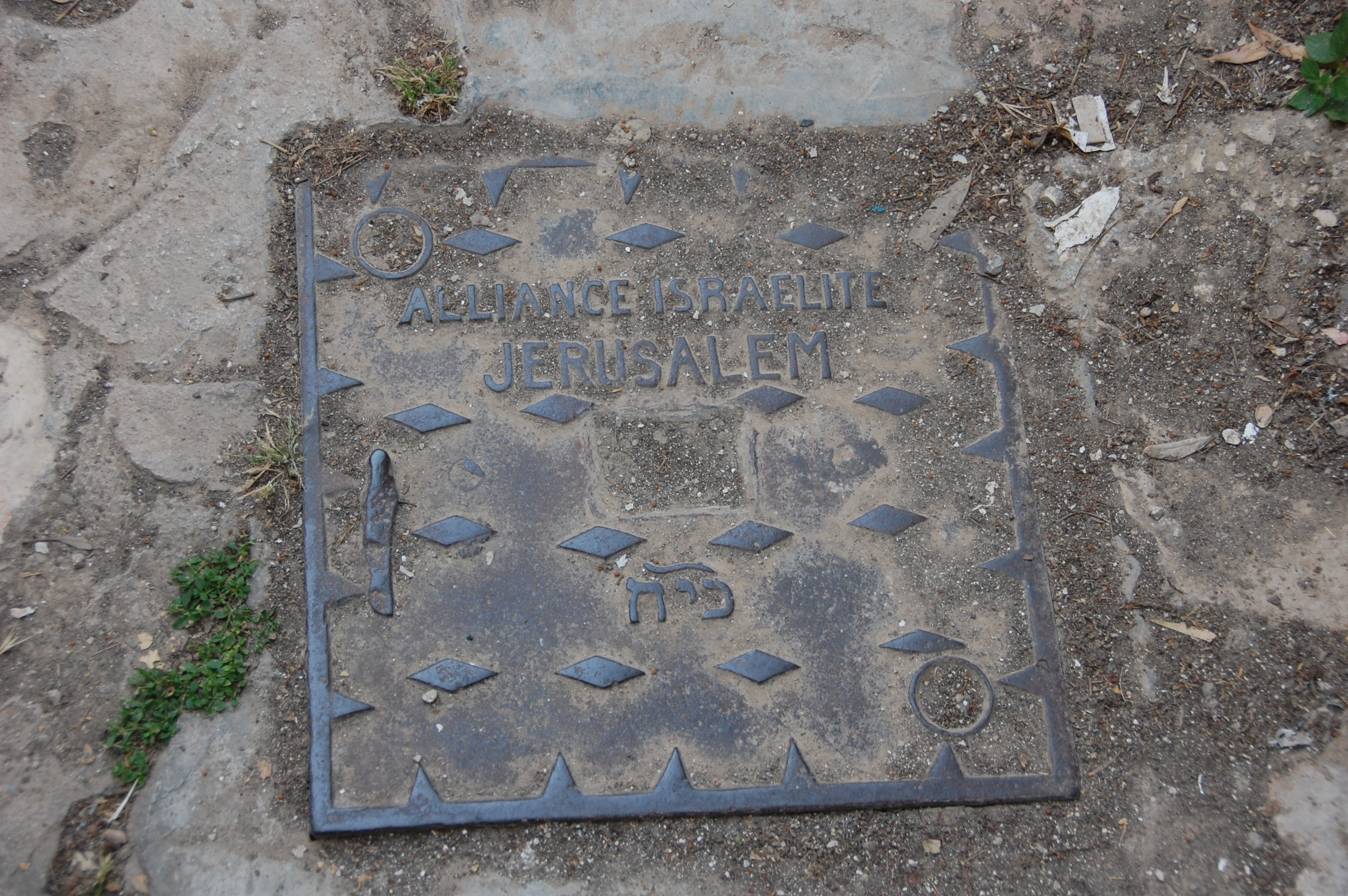 beit david ,jerusalem